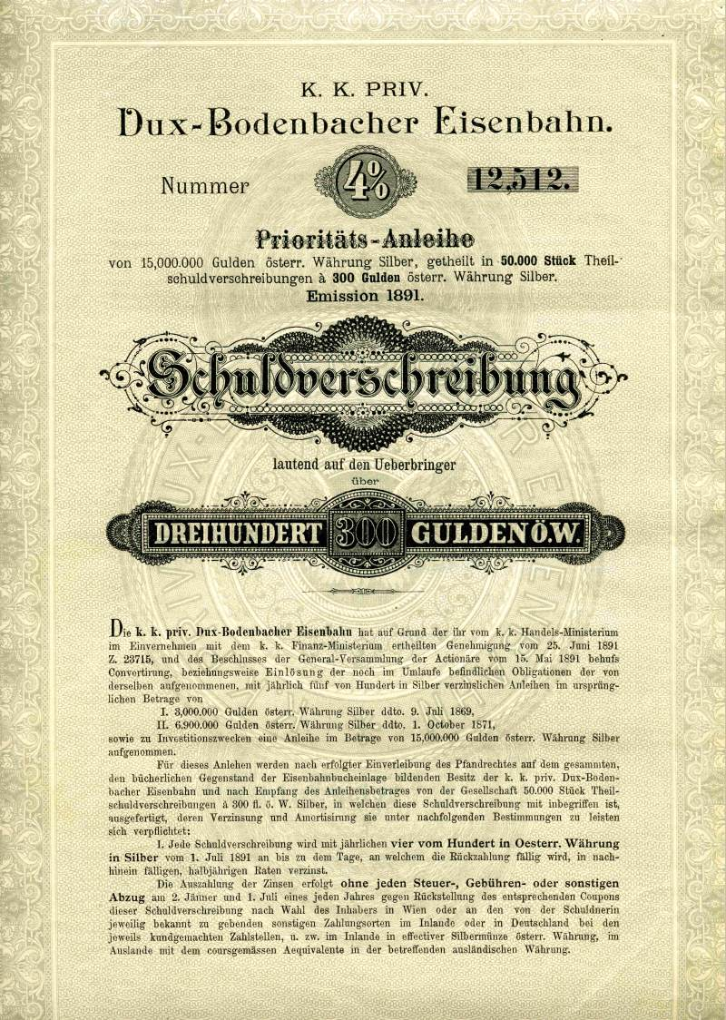 eine Nonvaleur-Anleihe der Dux-Bodenbacher Eisenbahn-Gesellschaft aus dem Jahr 1891